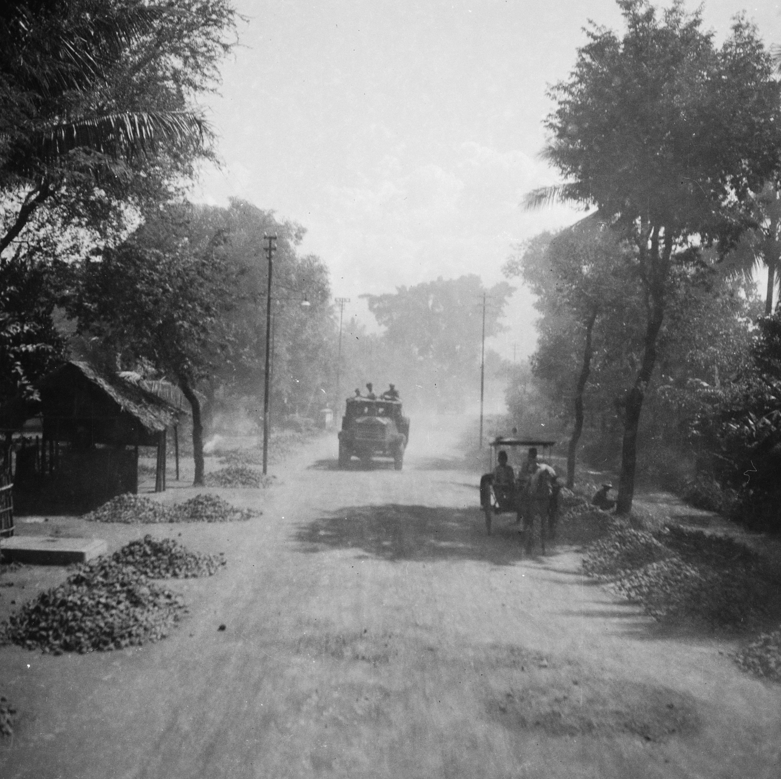 Collectie / Archief : Fotocollectie Dienst voor Legercontacten Indonesië Reportage / Serie : [DLC] Tocht door West-Java van de Huzaren van Boreel, w.o. radiowagen (filmwagen) Beschrijving : Collectie Fotocollectie Dienst voor Legercontacten Indonesië, fotonummer 15761 Datum : 13 maart 1948 Locatie : Indonesië, Nederlands-Indië Fotograaf : Fotograaf Onbekend / DLC Auteursrechthebbende : Nationaal Archief Materiaalsoort : Negatief (zwart/wit) Nummer archiefinventaris : bekijk toegang 2.24.04.03 Bestanddeelnummer : 15761